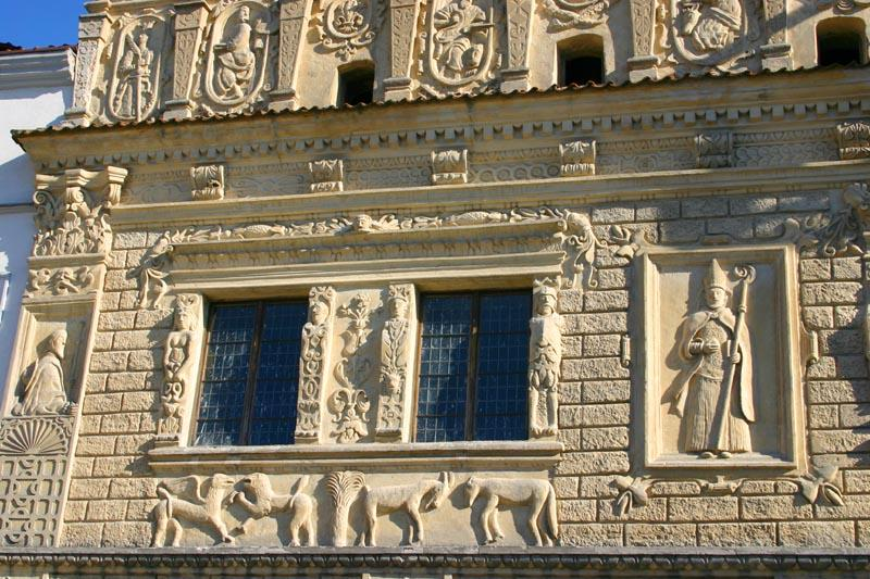 Kazimierz Dolny in Poland